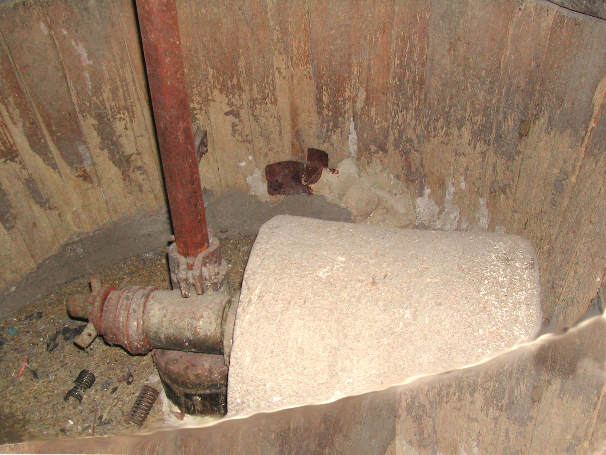 Cuve à décortiquer l’épeautre (détails de la meule)